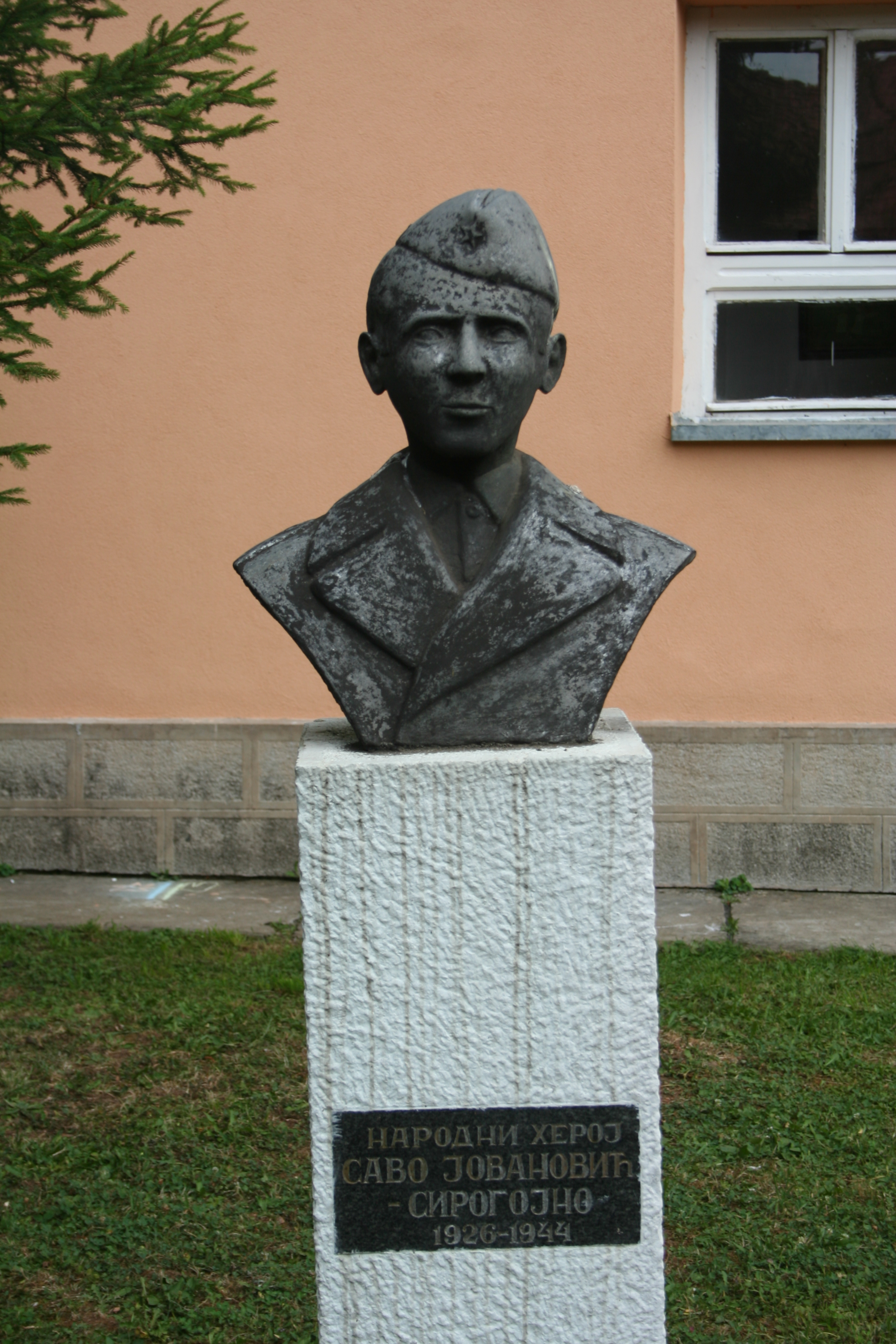 OŠ "Savo Jovanović Sirogojno" Sirogojno